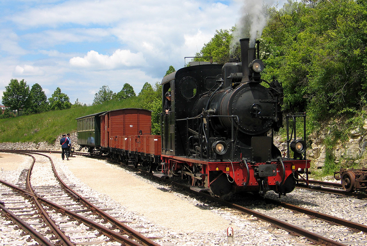 Lok 12 der Härtsfeld-Museumsbahn mit einem Sonderzug für Eisenbahnfreunde in der Centralstation Neresheim.